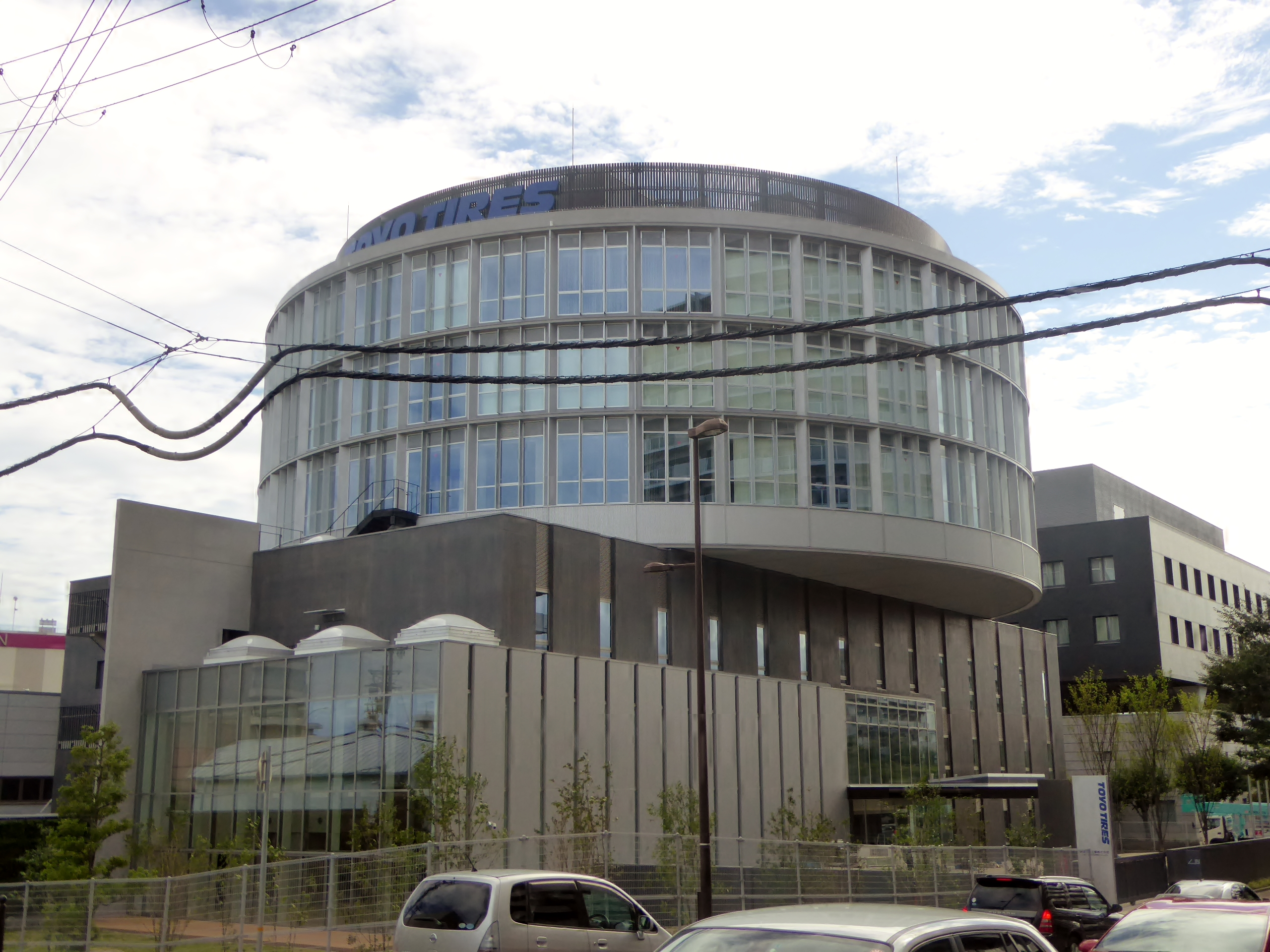 東洋ゴム工業株式会社本社を撮影。